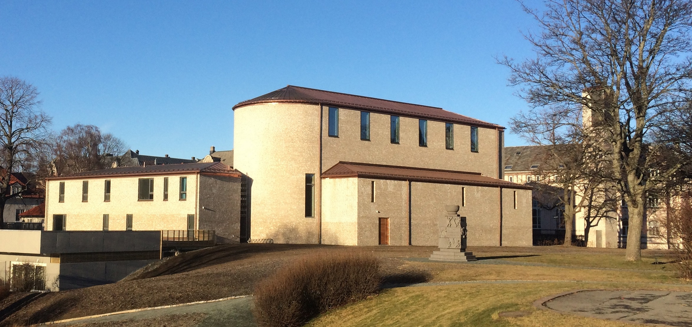 Nye St. Olav domkirke fra sørøst